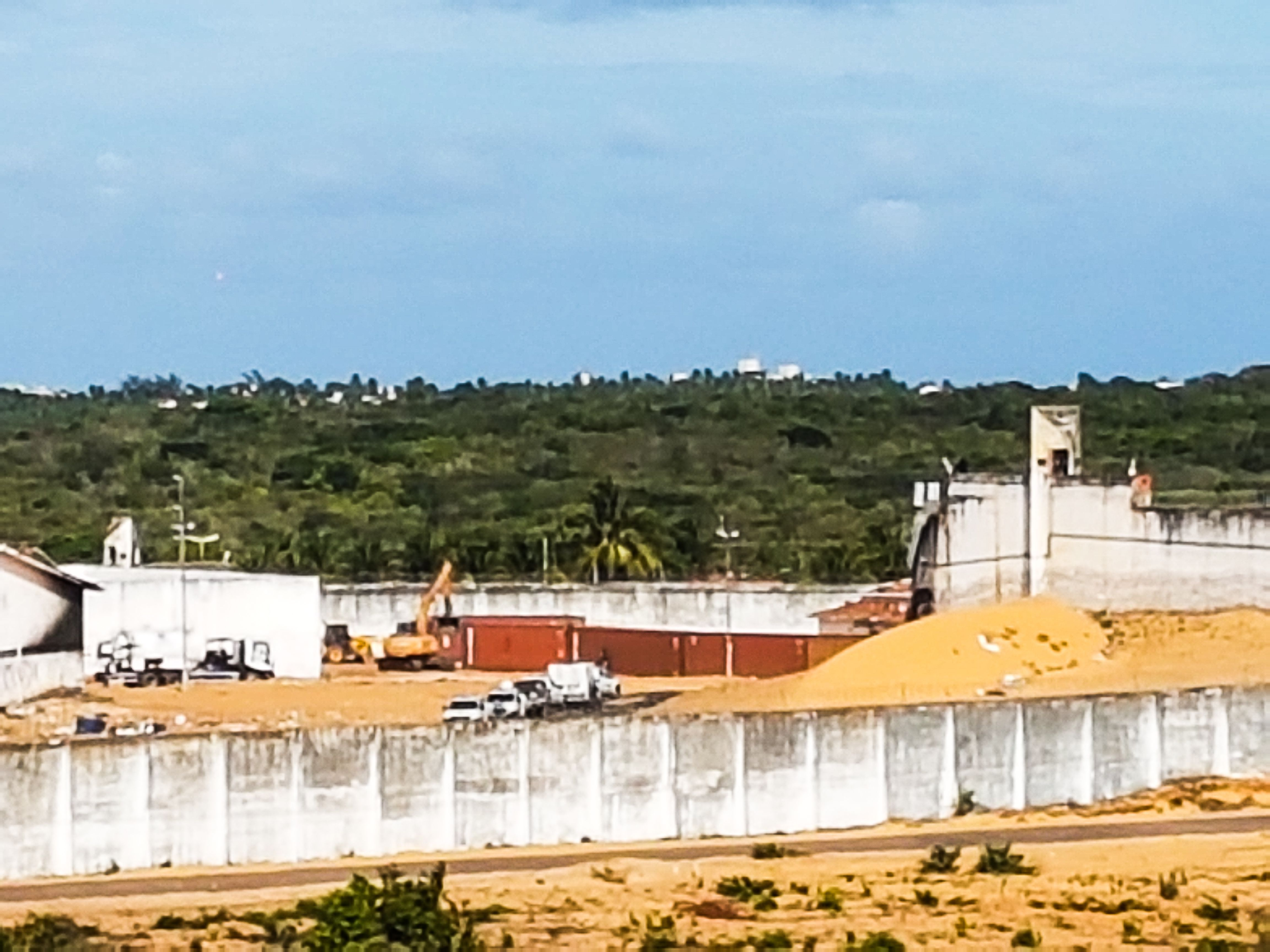 Natal - Presídio de Alcaçuz terá muros formados por contêiners.